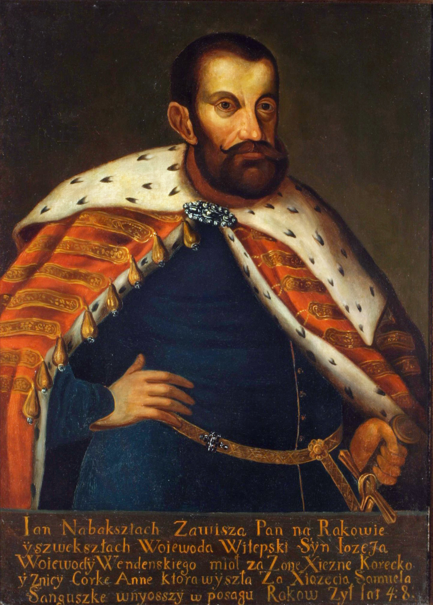 Беларуская (тарашкевіца): Партрэт Яна Завішы (Jan Zaviša) гербу «Лебедзь» (каля 1550 — 1626), дзяржаўнага дзеяча Вялікага Княства Літоўскага, ваяводы амсьціслаўскага і віцебскага